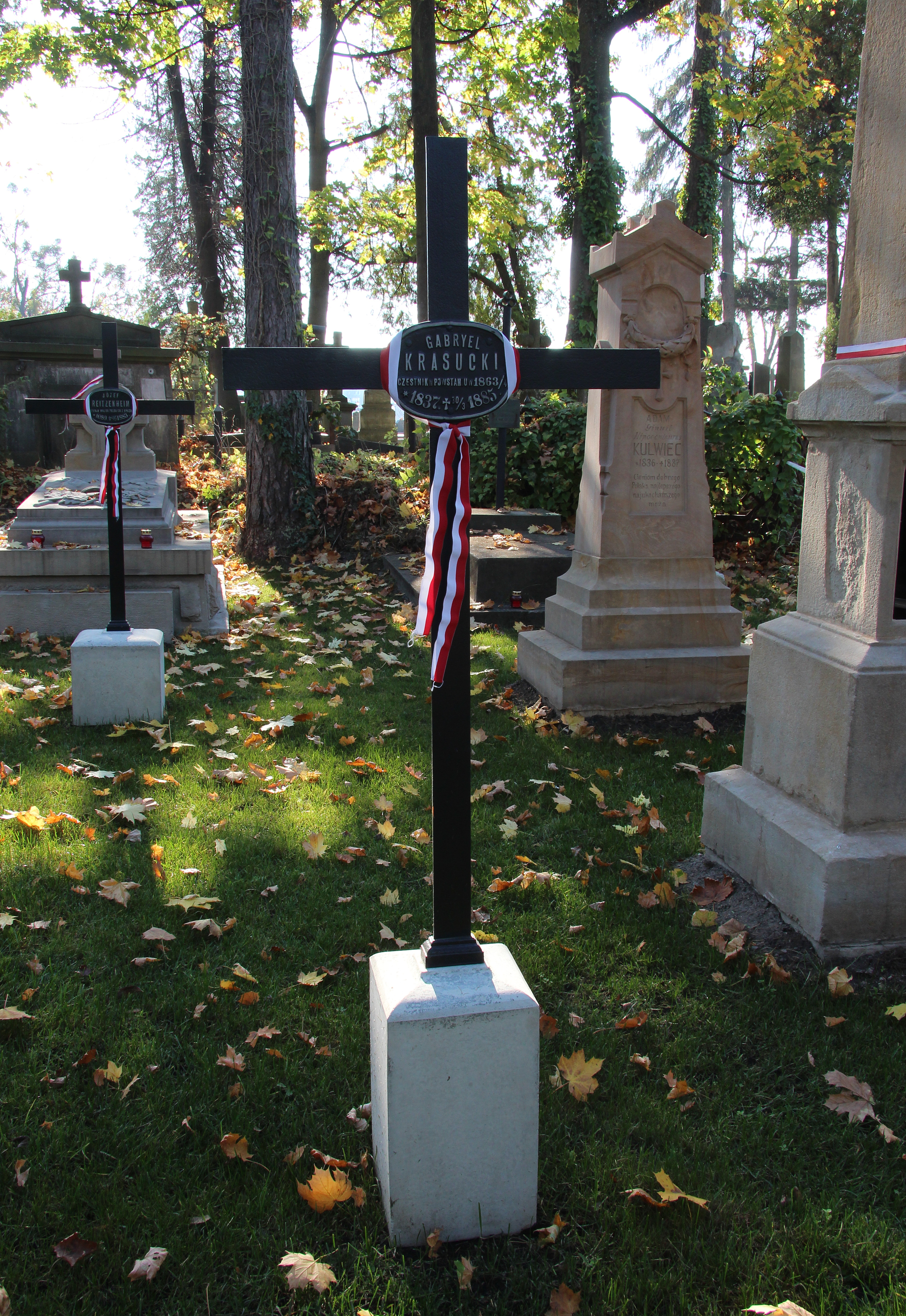 Могила Г. Красуцького.Личаківський цвинтар , поле № 71.